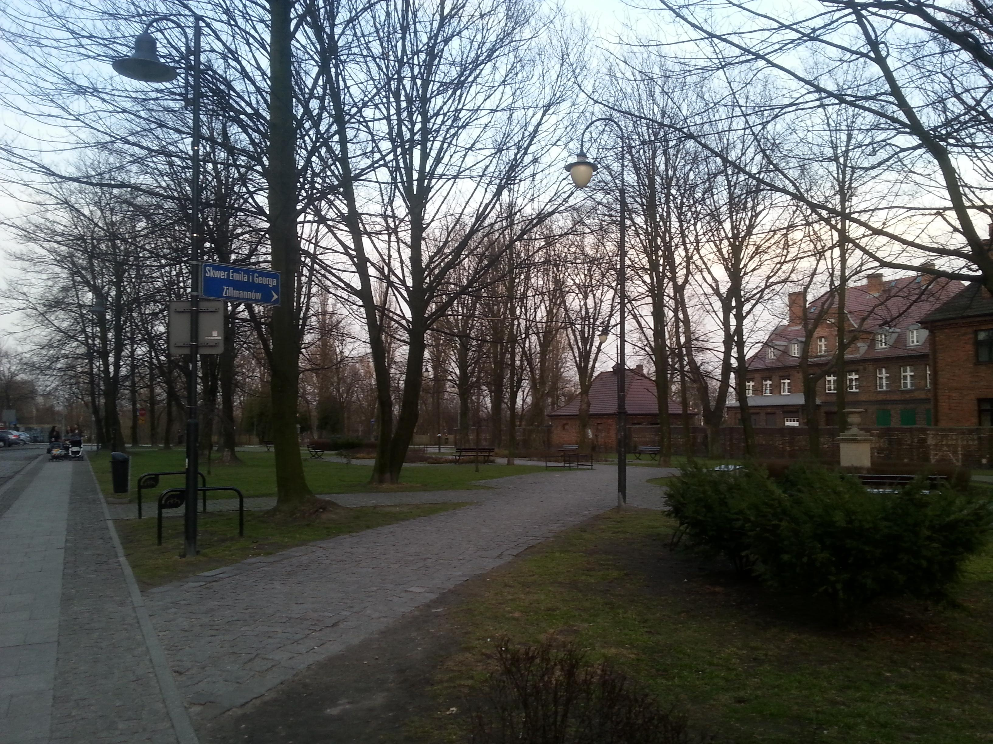 Widok na skwer ze strony rynku na Nikiszowcyu